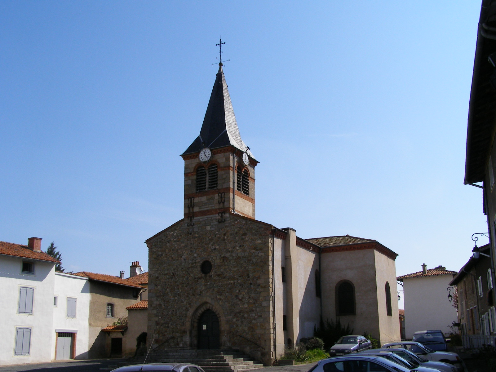 Église de l’Assomption Epoque de construction : ancienne chapelle des chanoinesses, 12ème remaniée au 17ème siècle.